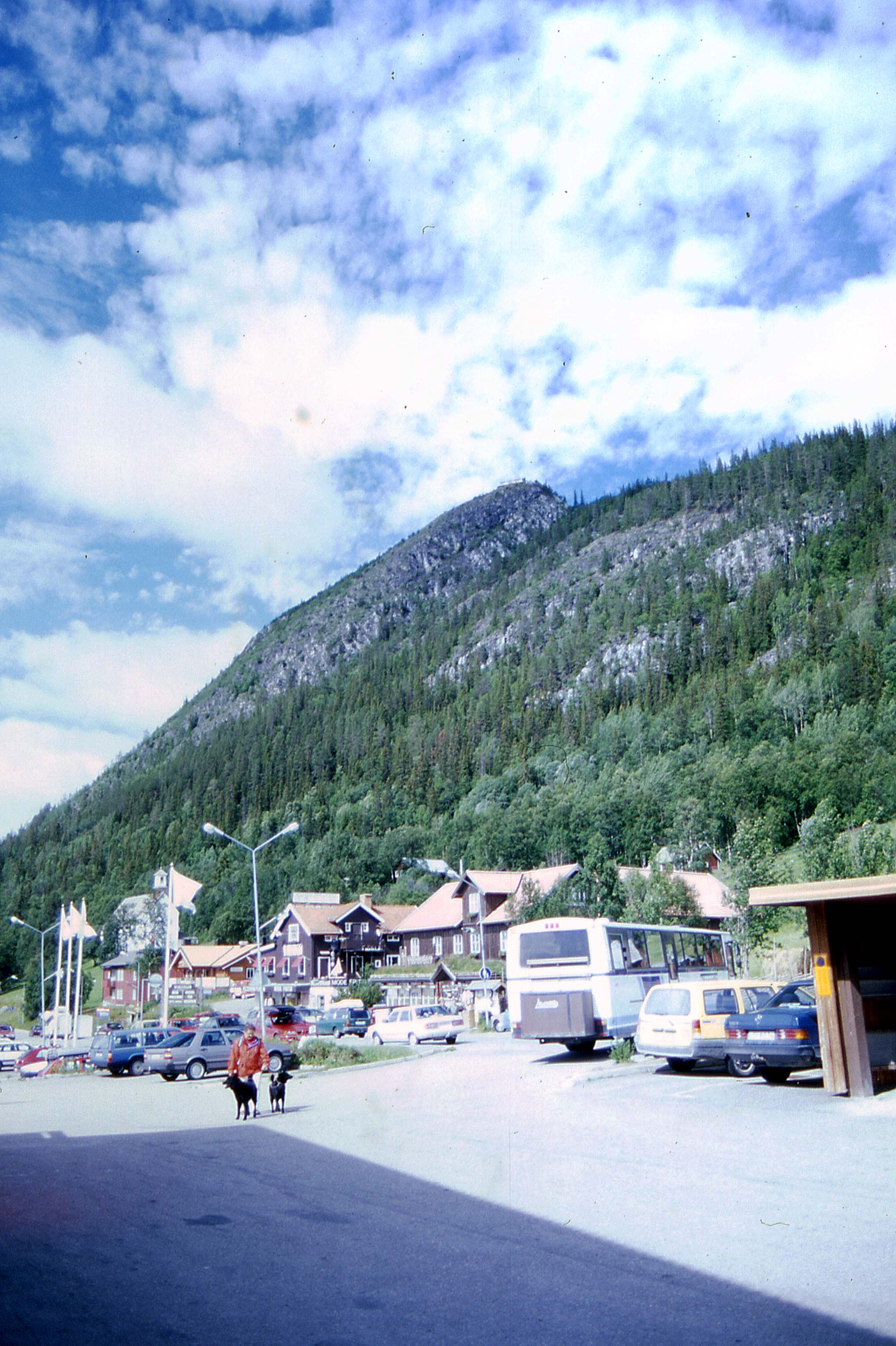 selbst fotografiert, Juli 1997